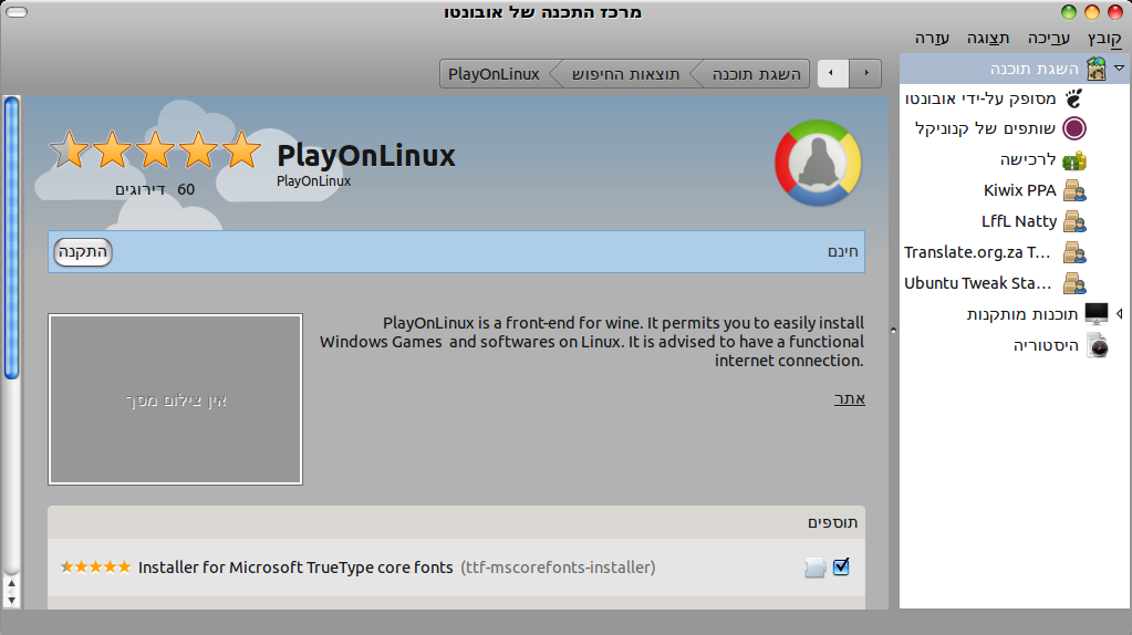 פלייאוןלינוקס במרכז התוכנה של אובונטו